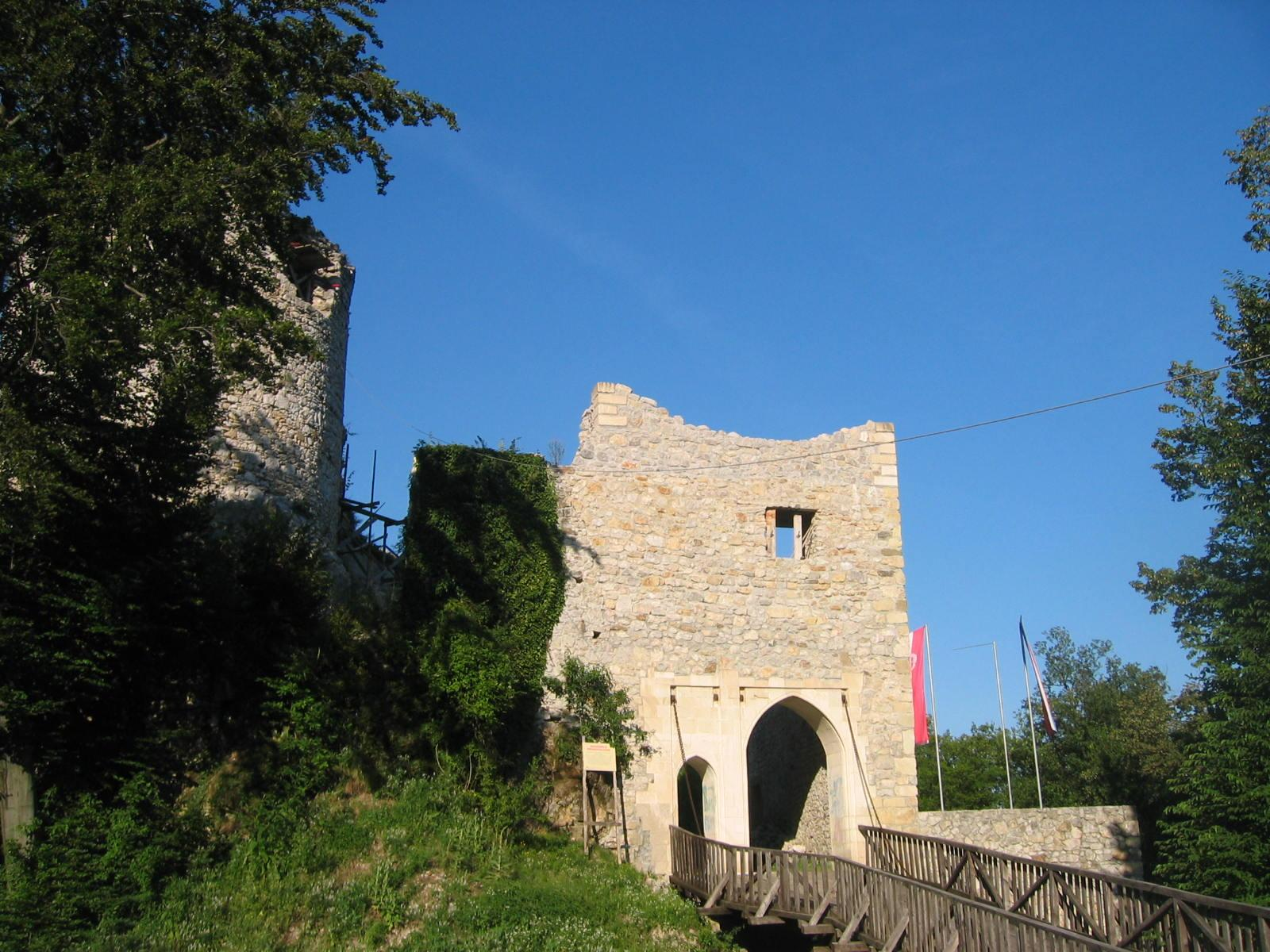 Žovnek Castle near Braslovče, Slovenia photo:Ziga 10:31, 22 August 2006 (UTC)